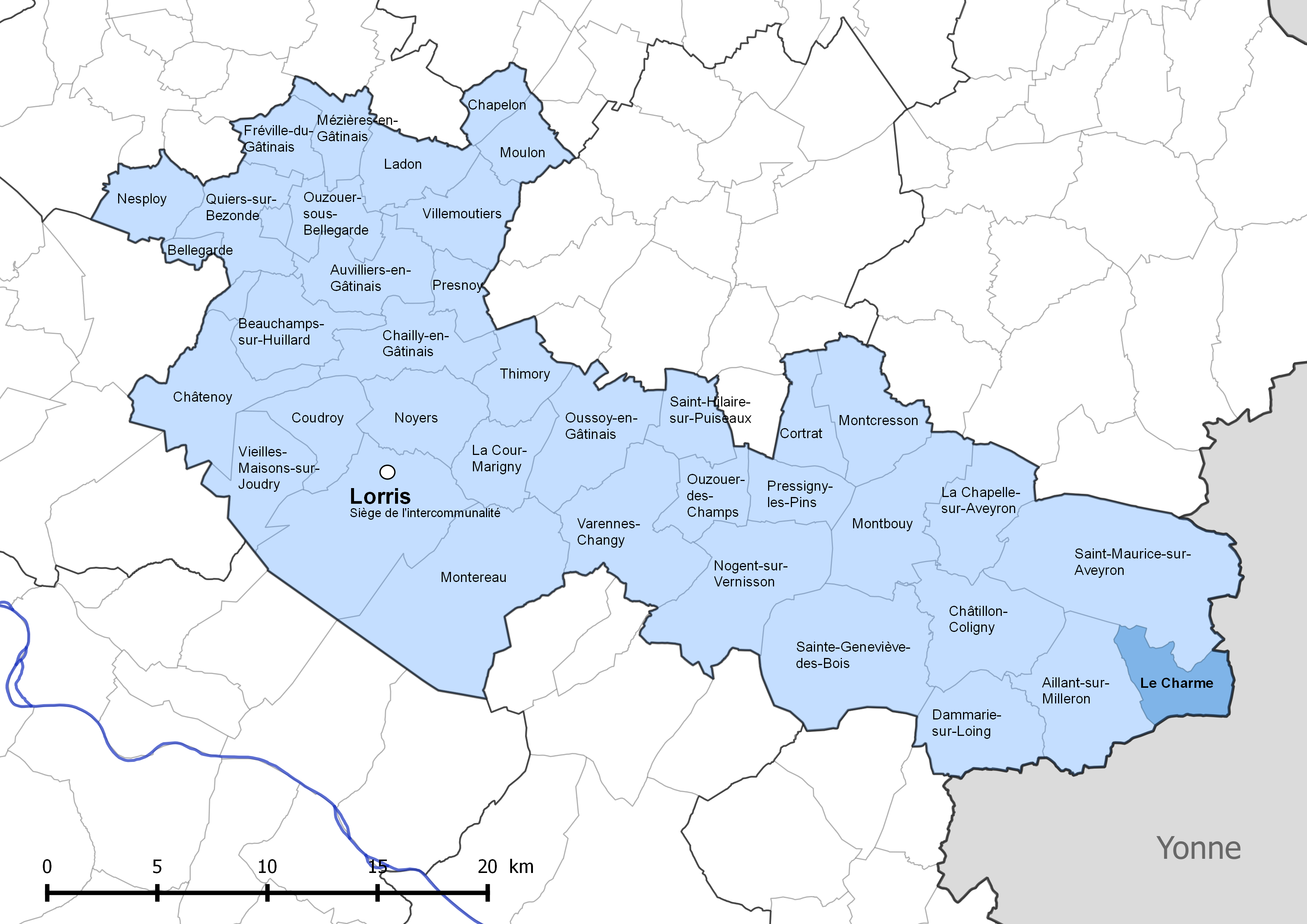 Périmètre de la communauté de communes Canaux et forêts en Gâtinais - Situation de la commune de Le Charme.